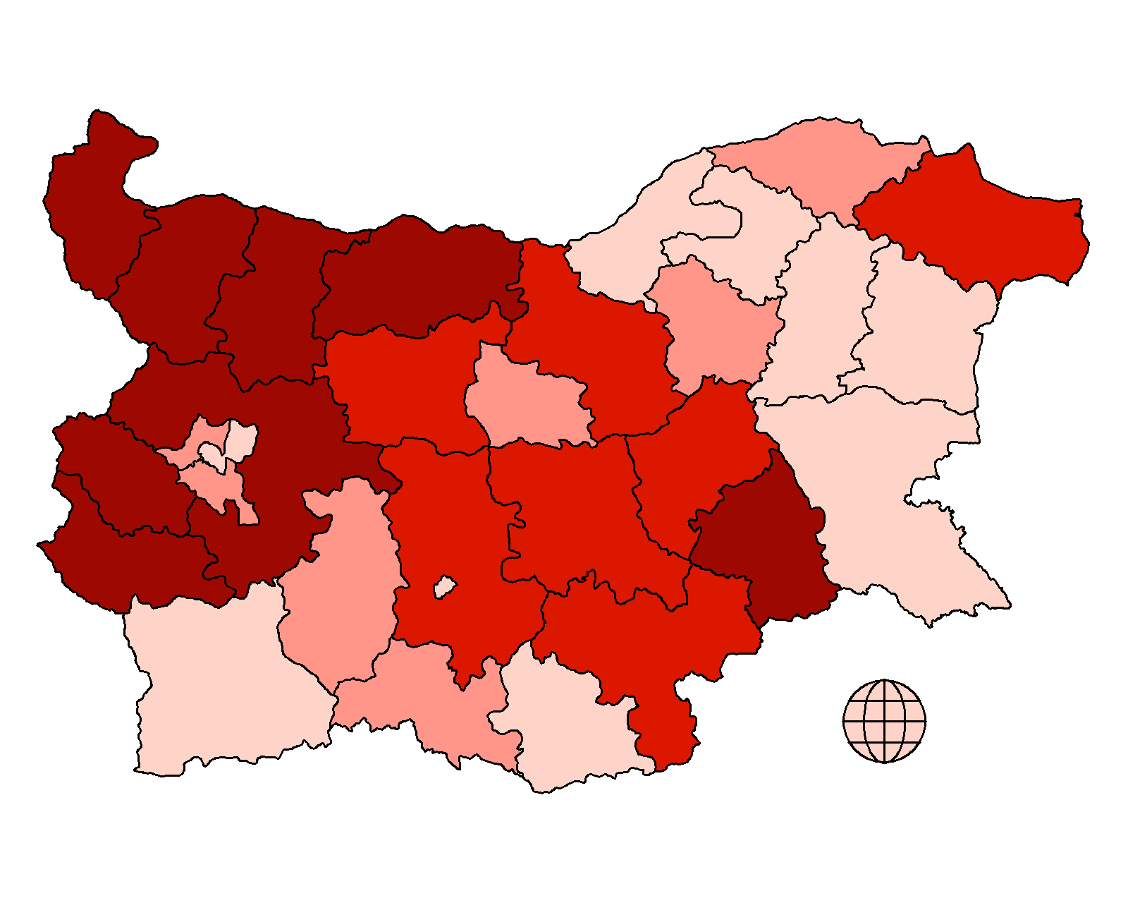 Гласуване по райони за Коалиция за България на парламентарните избори през 2005. Всеки от цветовете съответства на приблизително 1/4 от подадените гласове По тъмният цвят съответства на получен по-голям процент от гласовете